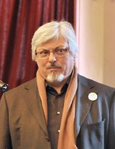 Foto: Carme Esteve